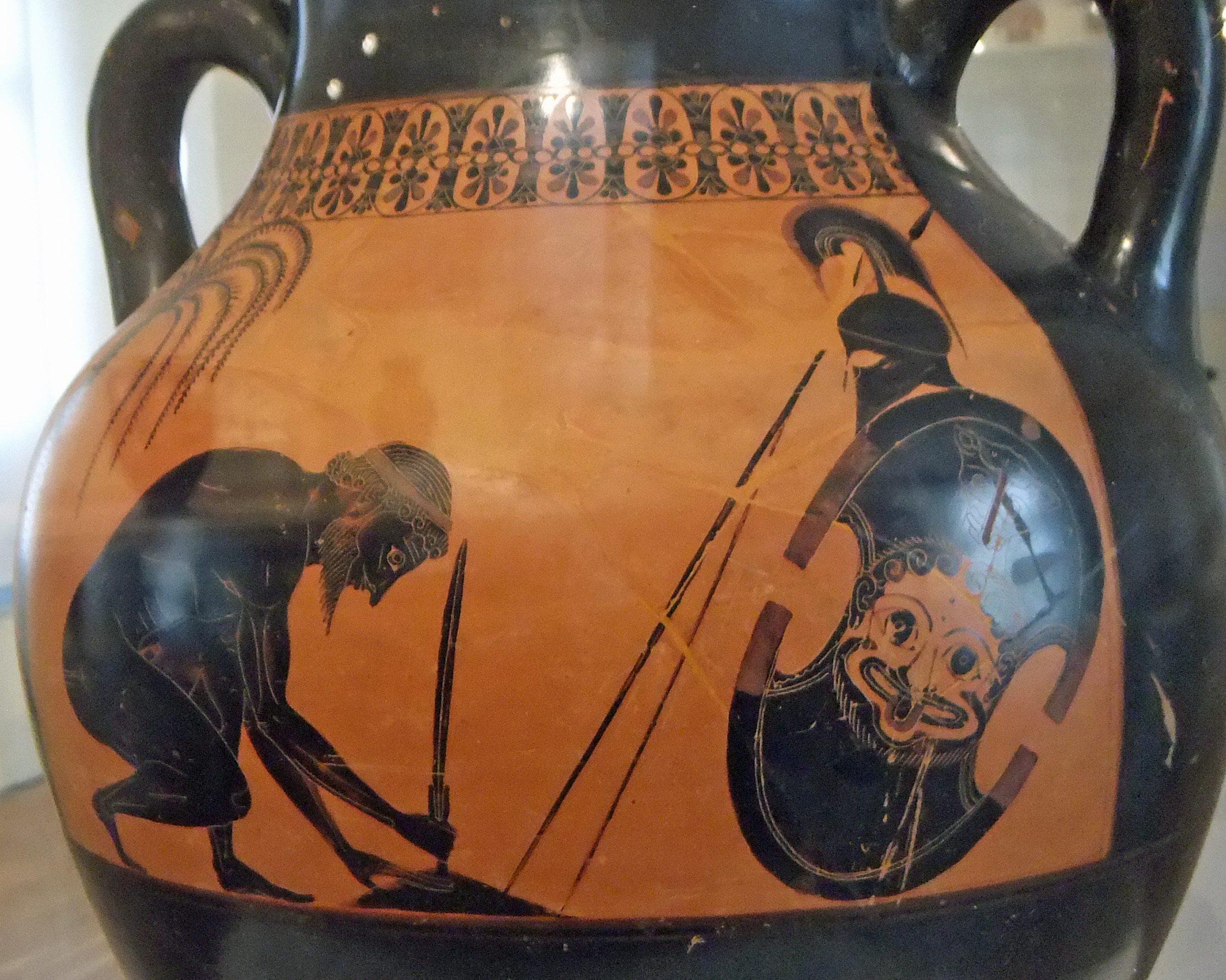 Vorbereitung des Ajax auf seinen Selbstmord. Bild auf der attisch-schwarzfigurigen, von Exekias bemalten Amphora; um 530/25 v. Chr., heute im Château-musée de Boulogne-sur-Mer.